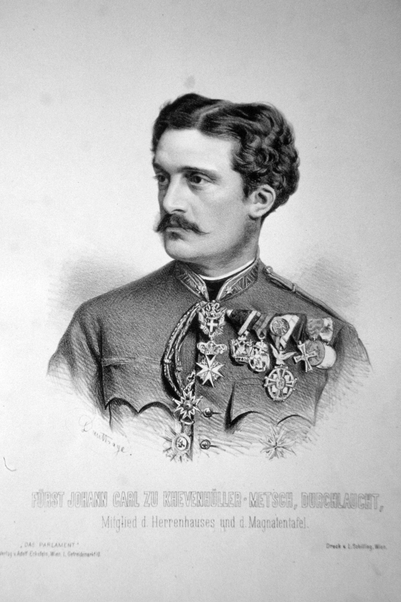 Johann Carl Fürst von Khevebhüller-Metsch (1839-1905), k. k. Kämmerer, Vliesritter, Abgeordneter zum Reichsrat und Mitglied der Magnatentafel. Bebleiter von Kaiser Maximilian von Mexiko. Lithographie von Adolf Dauthage, ca. 1880